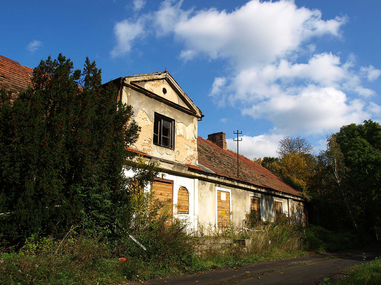 Moszna-Wieś - stara opuszczona willa